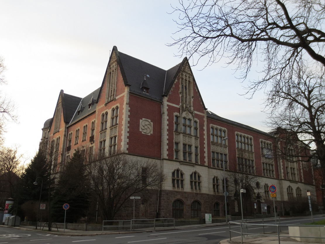 Kulturdenkmal Chemnitz Kaßberg